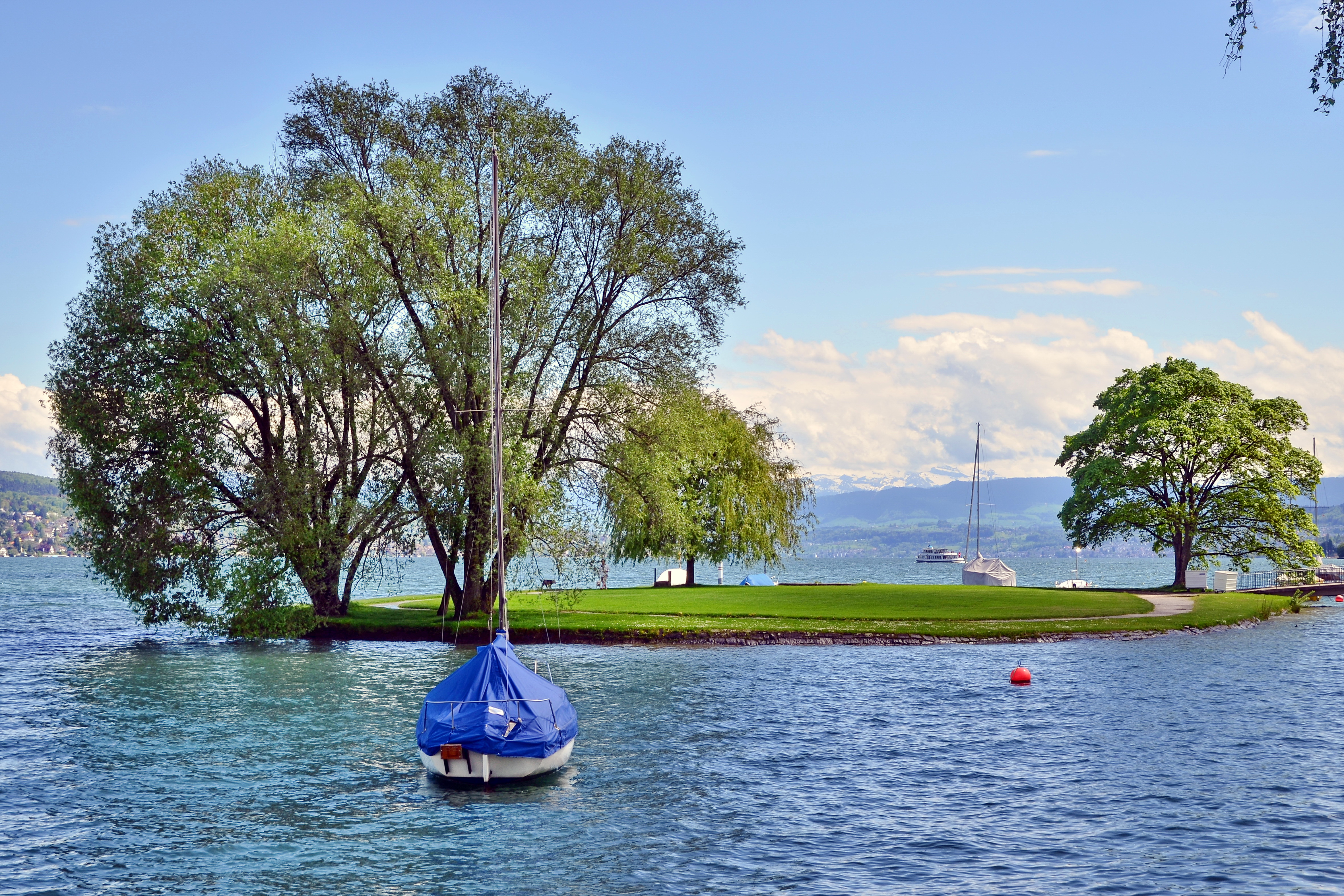 SAFFA island on Zürichsee and Zimmerberg region as seen from Landiwiese in Zürich-Wollishofen (Switzerland)